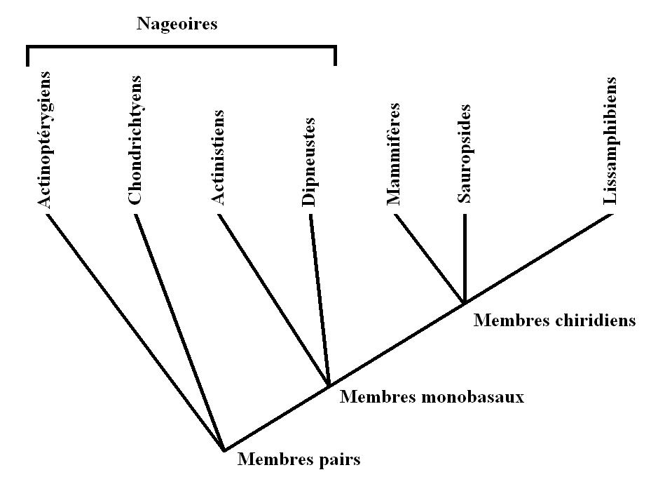 L'homologie en 3ia